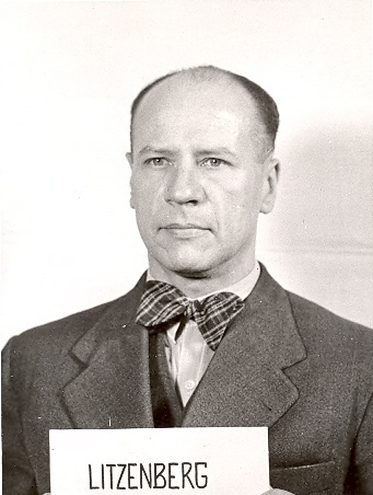 Willy Litzenberg (* 27. November 1900 in Liebenwalde; † 1964 in Würzburg) war SS-Obersturmbannführer und Kriminalrat.